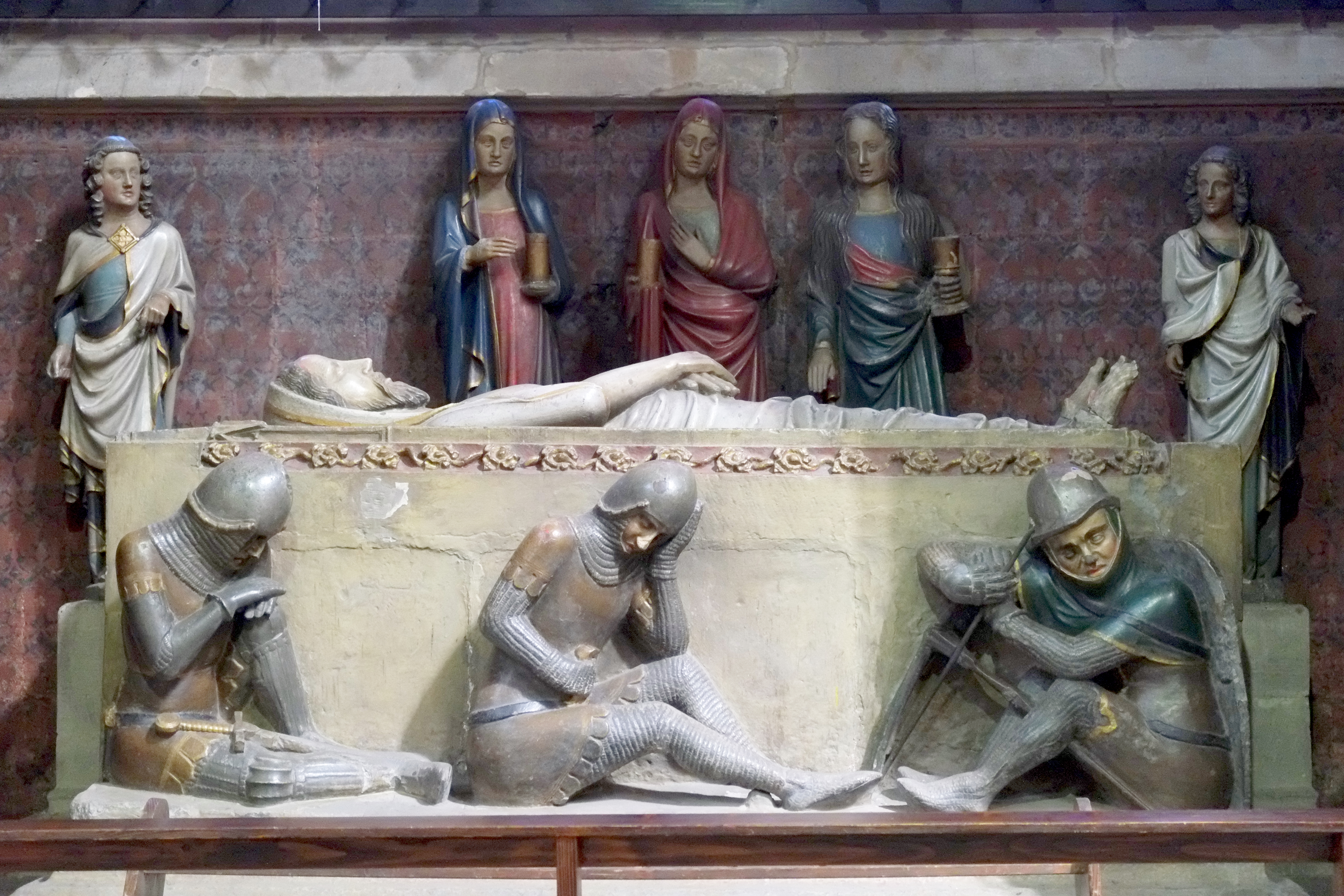 Heilig-Kreuz-Münster in Schwäbisch Gmünd (Baden-Württemberg, Deutschland)